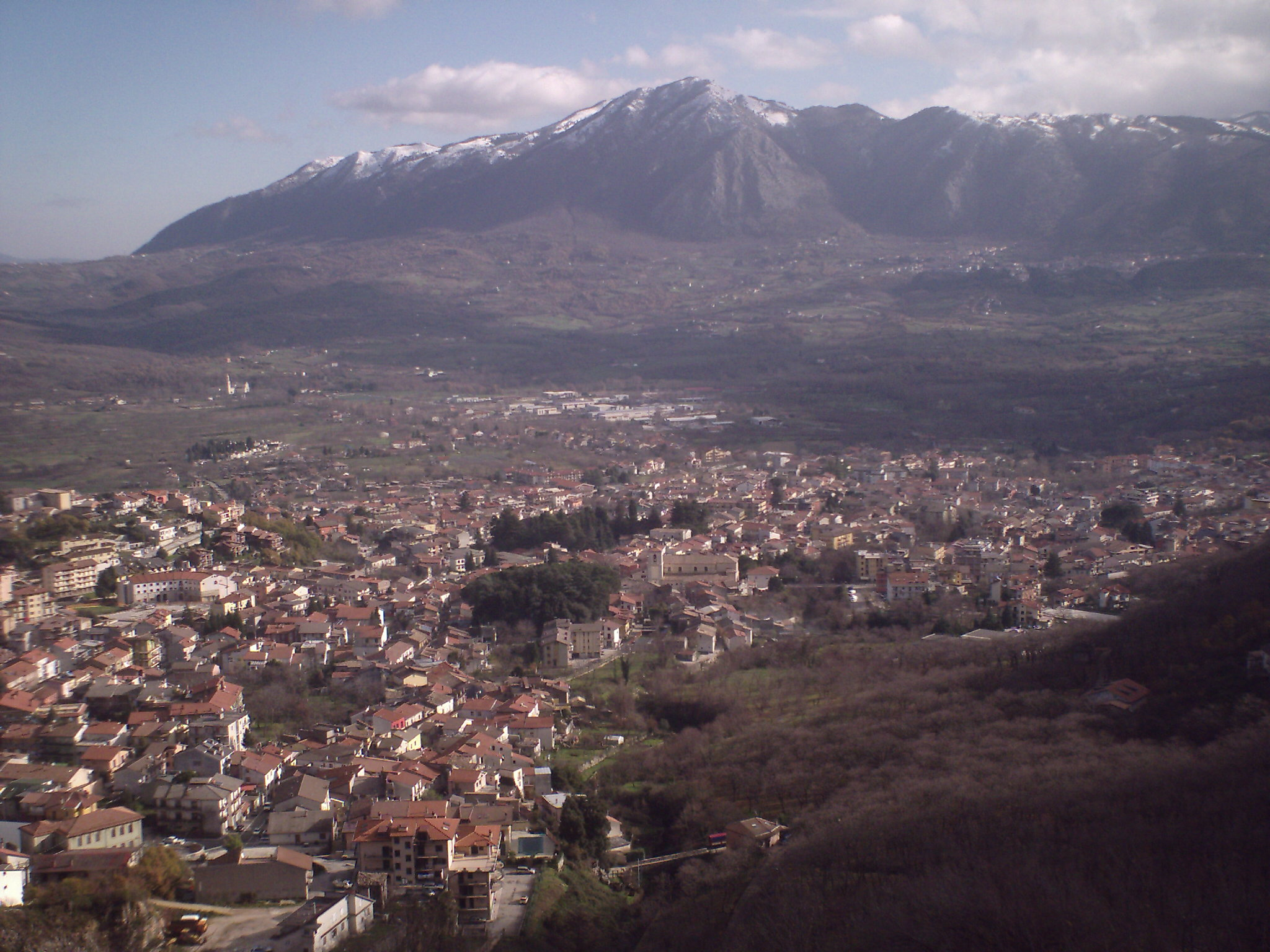 Immagine che ritrae Montella ai piedi dei monti dai quali è circondata. Prov. di Avellino, Italia; l'immagine è stata scattata dalla sommità della Cerzolla.